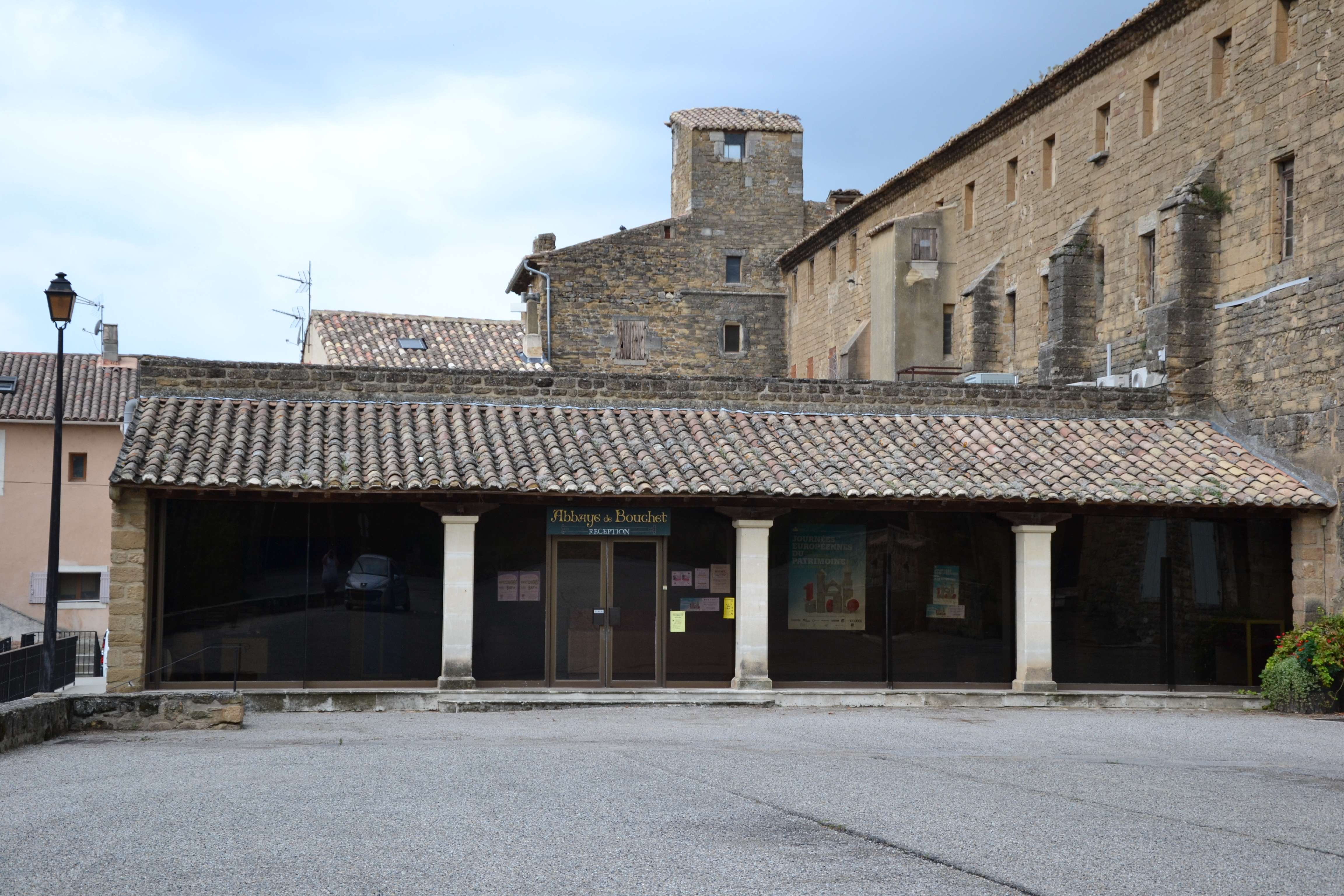 Abbaye de Bouchet (Inscription) .